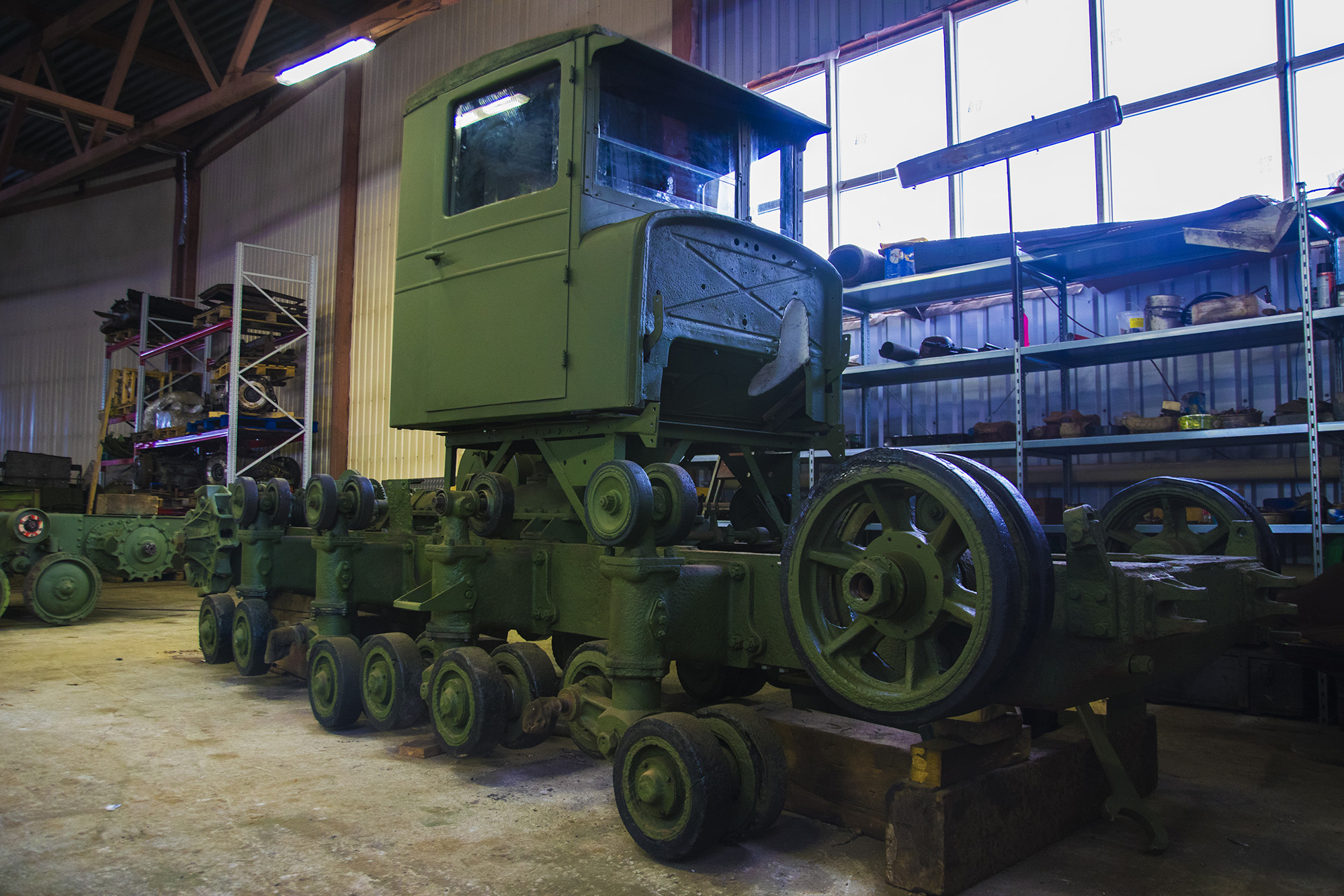 До наших дней сохранился только один тягач «Коминтерн»